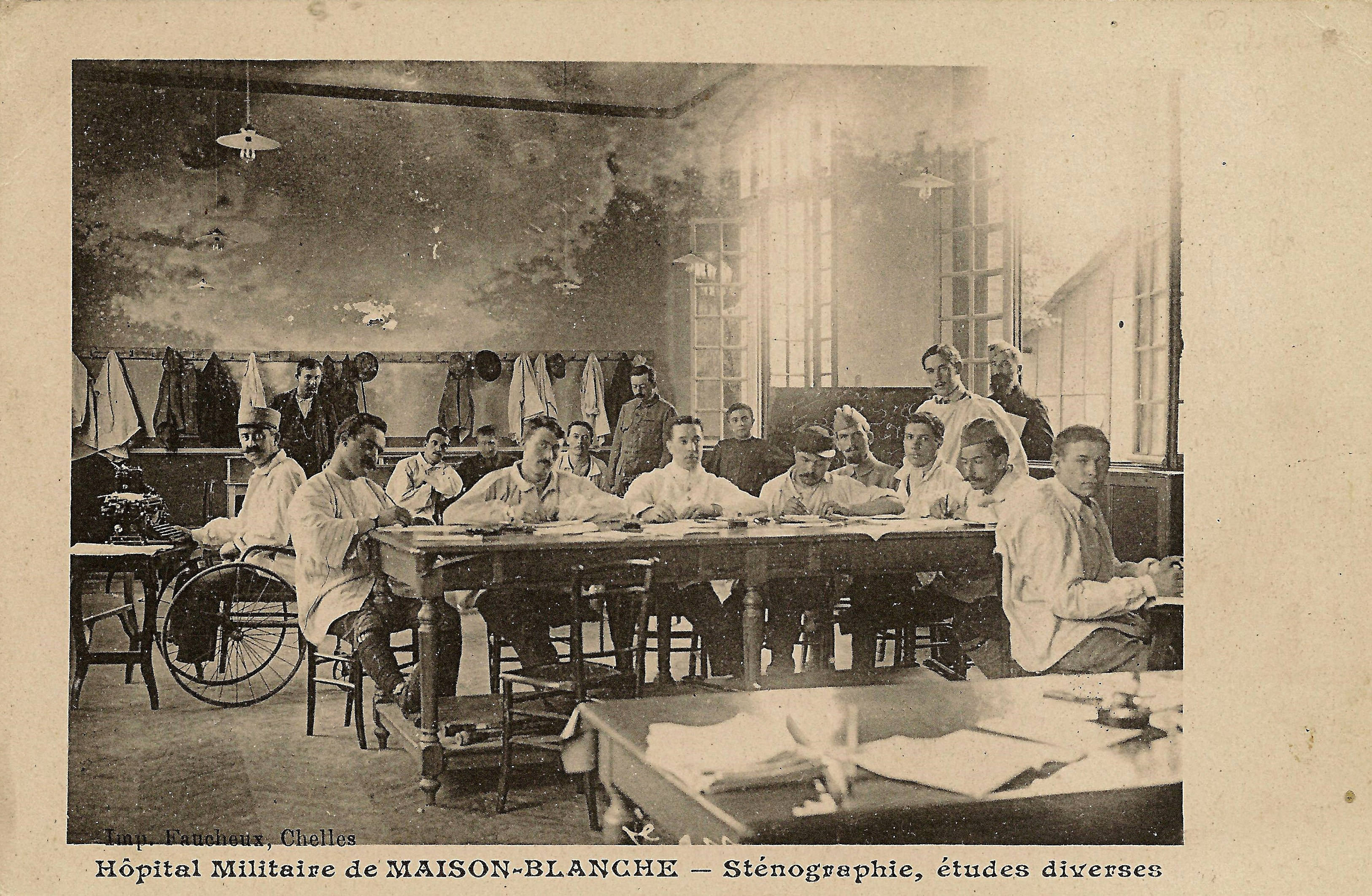 Neuilly-sur-Marne, Hôpital militaire de Maison-Blanche : Sténographie, Études diverses